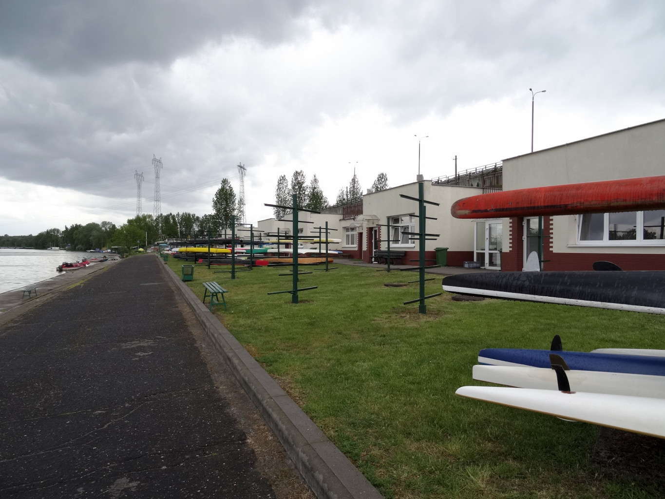 Tor regatowy w Bydgoszczy-Brdyujściu